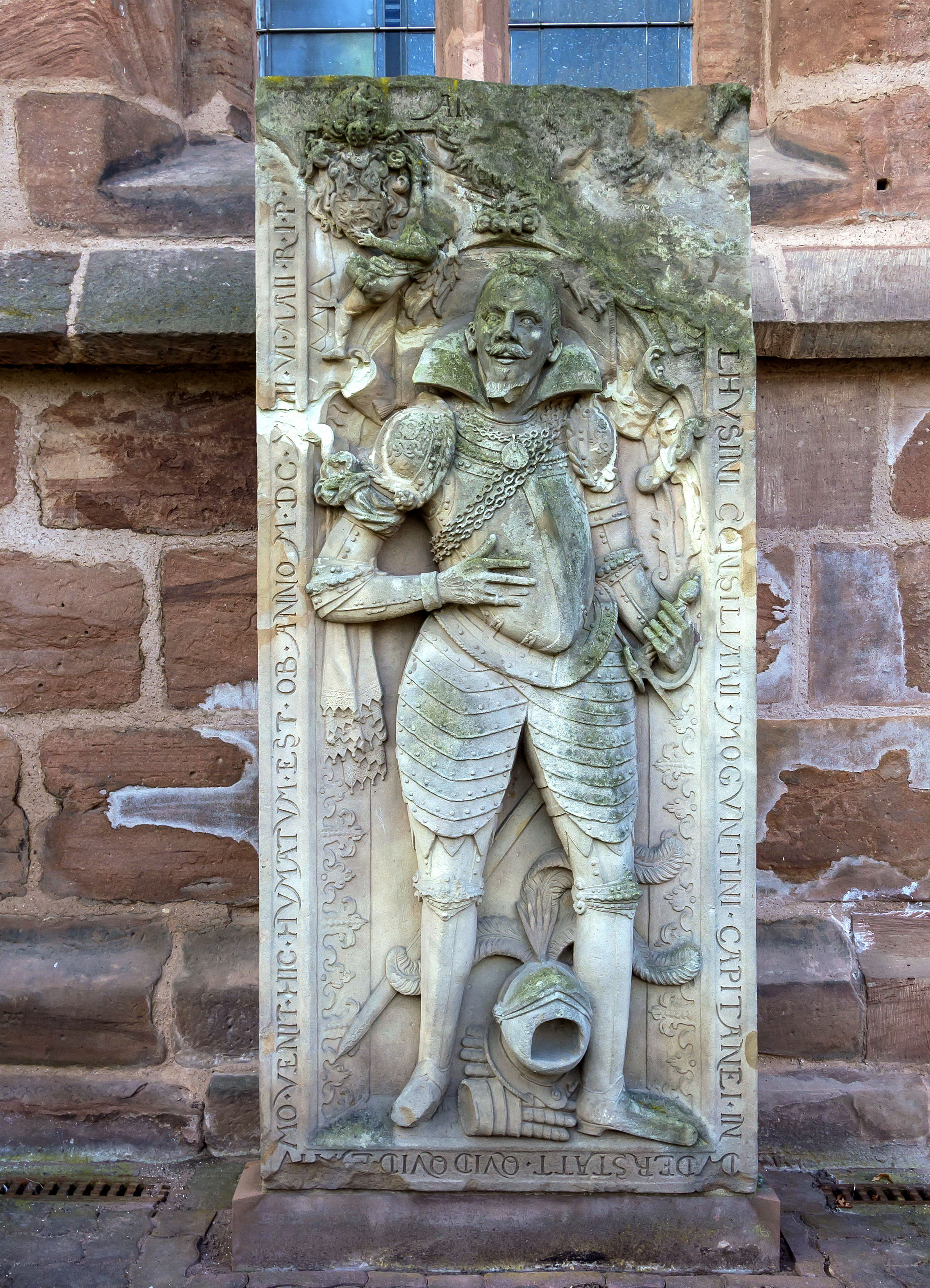 Heilbad Heiligenstadt Neustädter Kirchgasse 5 St. Ägidien Pfarrkirche (katholisch) Ausstattung Kirchhof Grabplatte Nordseite I (möglicherweise handelt es sich um die Grabplatte des Duderstädter Stadthauptmannes Andreas Birkner (Stadthauptmann 1608, eingesperrt auf dem Rusteberg 1613, verstorben 1613/14?)